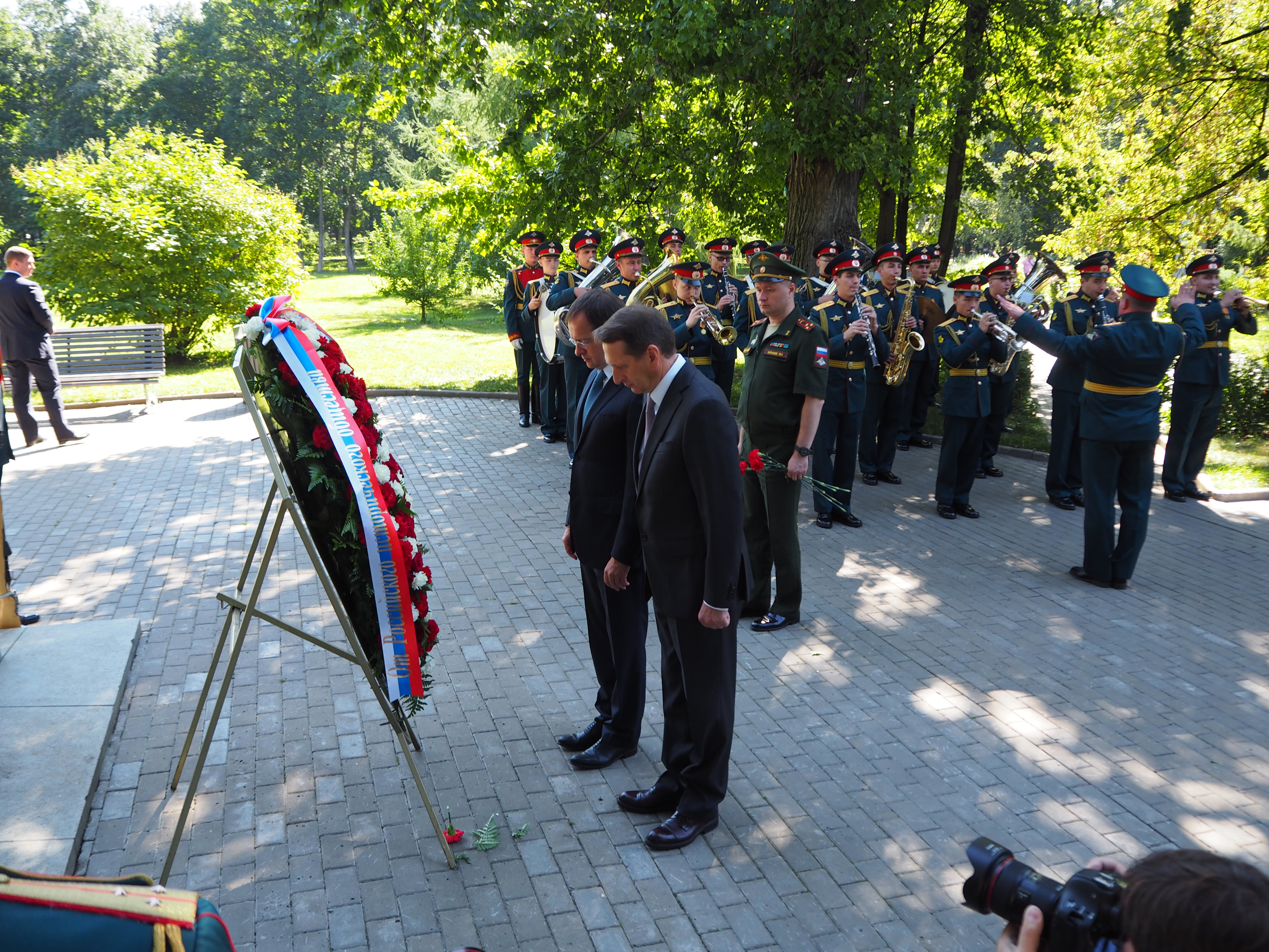 Мероприятия в день памяти героев Первой мировой войны на территории мемориального парка в Москве.